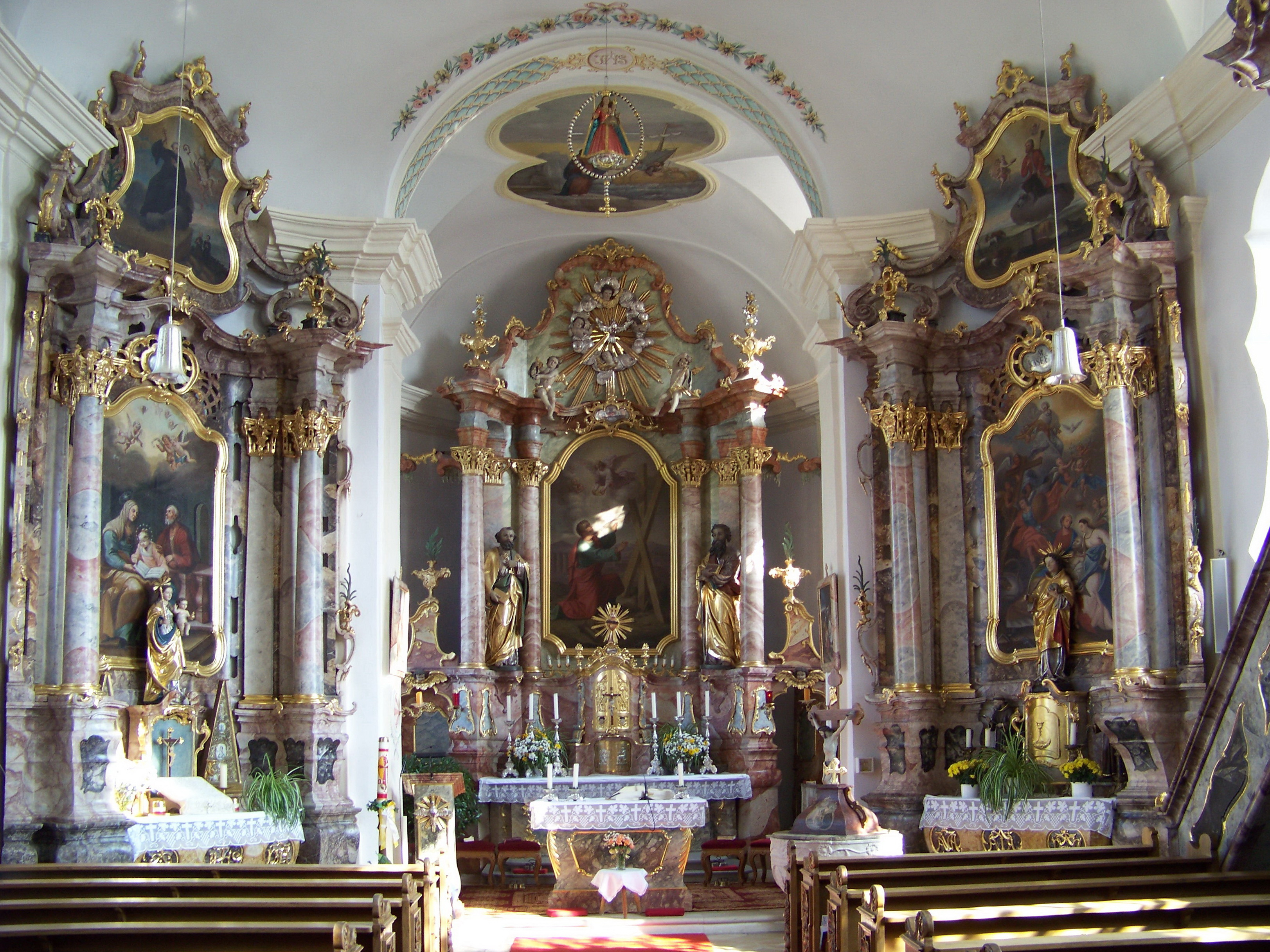 Neufahrn in Niederbayern. Hofendorf 28. Filialkirche St. Andreas. Saalkirche mit eingezogenem Chor und Westturm, Gliederung durch Lisenen und Putzbänder, Westturm mit Geschossgliederung, Achteckaufsatz und Zwiebelkuppel, 1747 von Johann Georg Hirschstötter; mit Rokoko-Ausstattung.